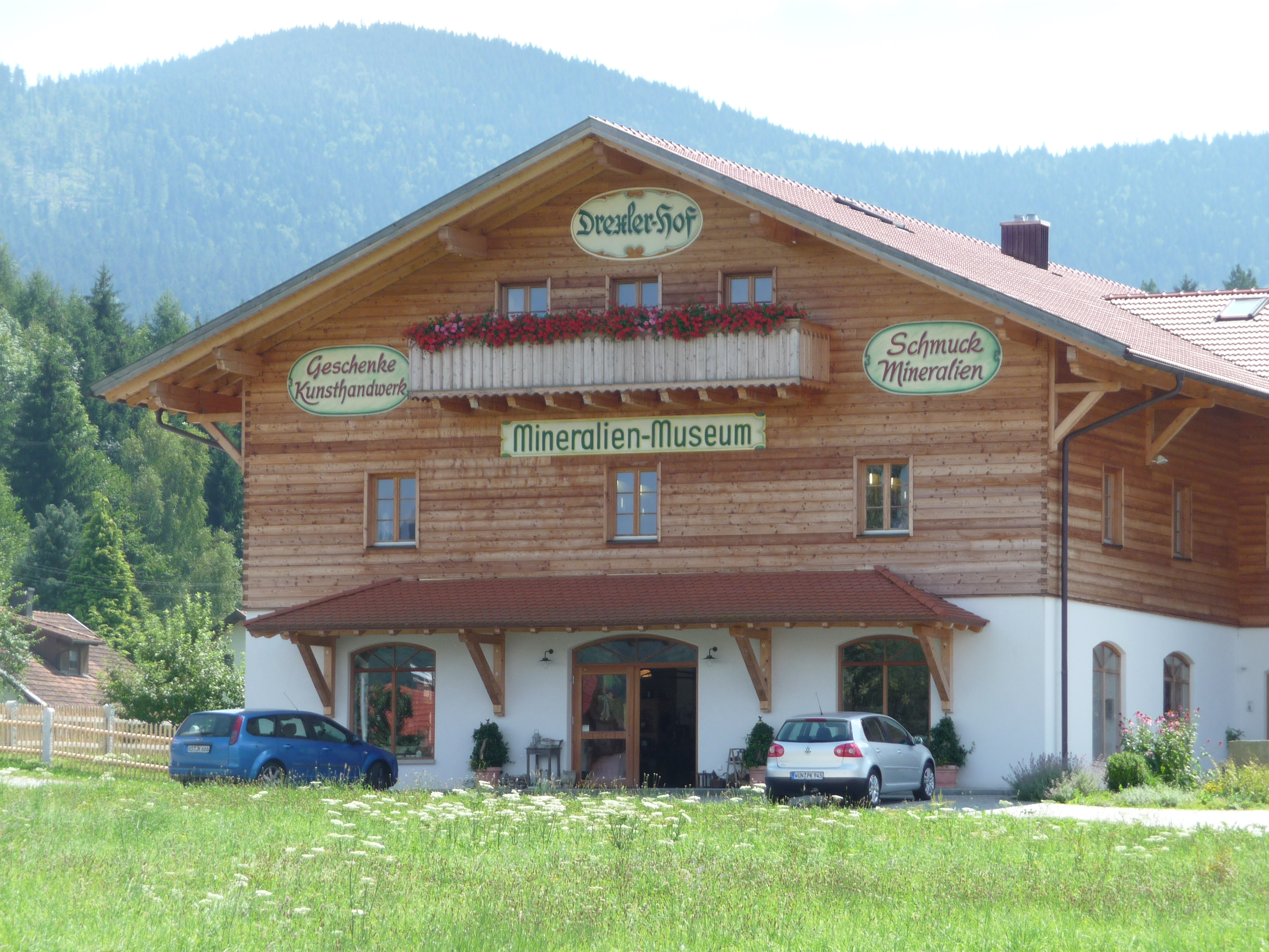 Das Mineralienmuseum im Drexler-Hof in Arrach